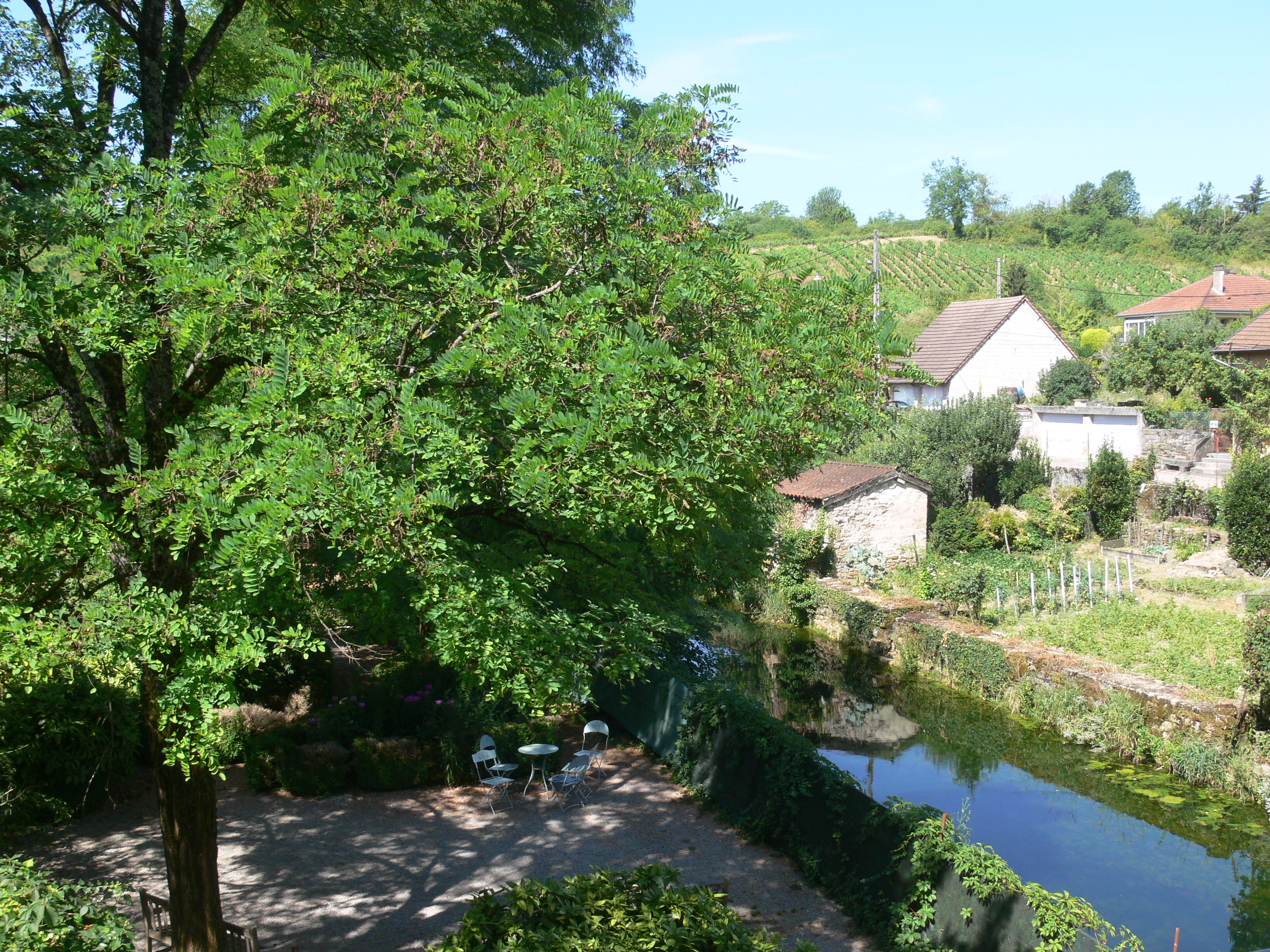 Arbois - maison de Pasteur .